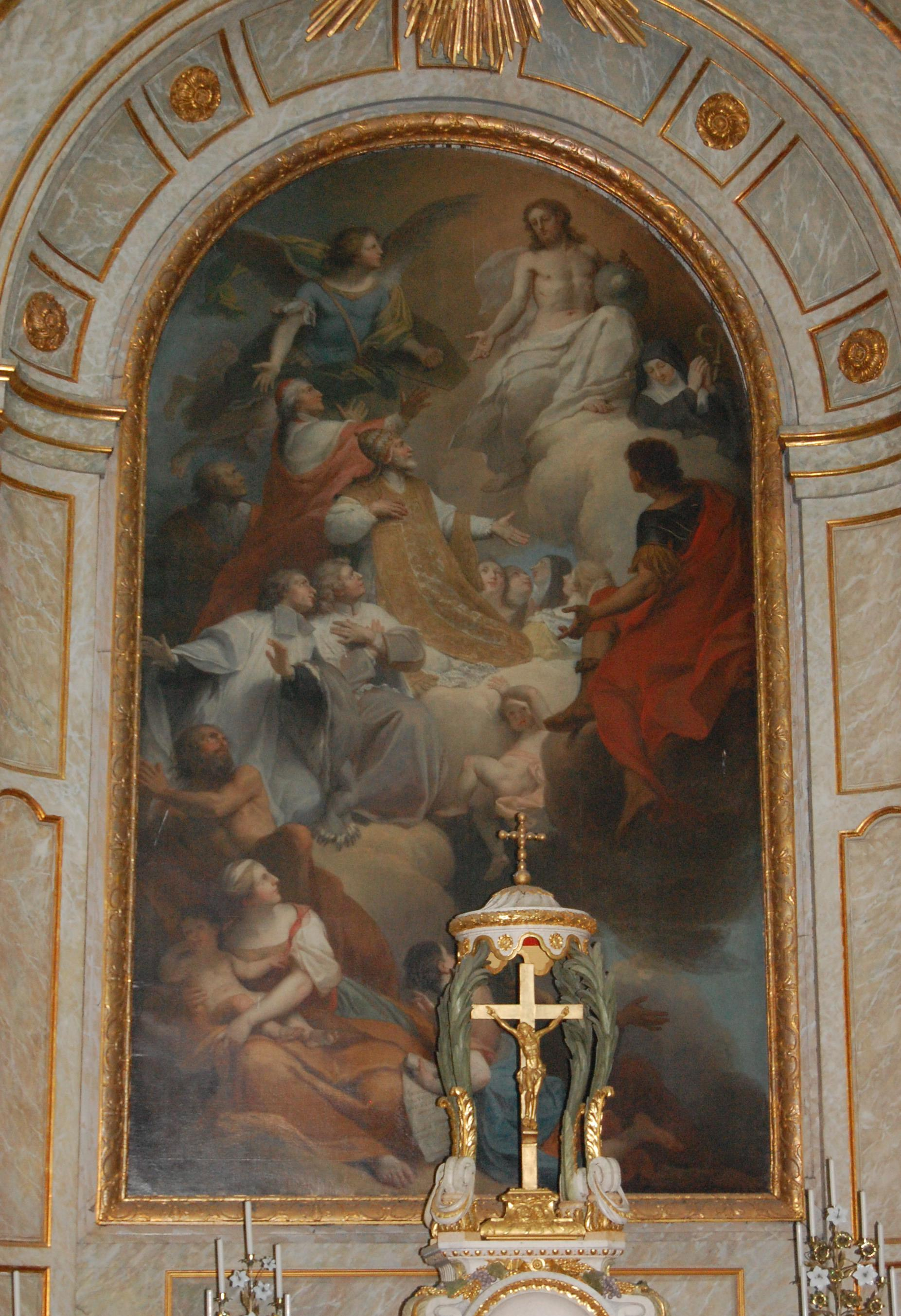 Jésus recevant les adorations de l'univers de N. Delobel, 1732 detail du retable nord